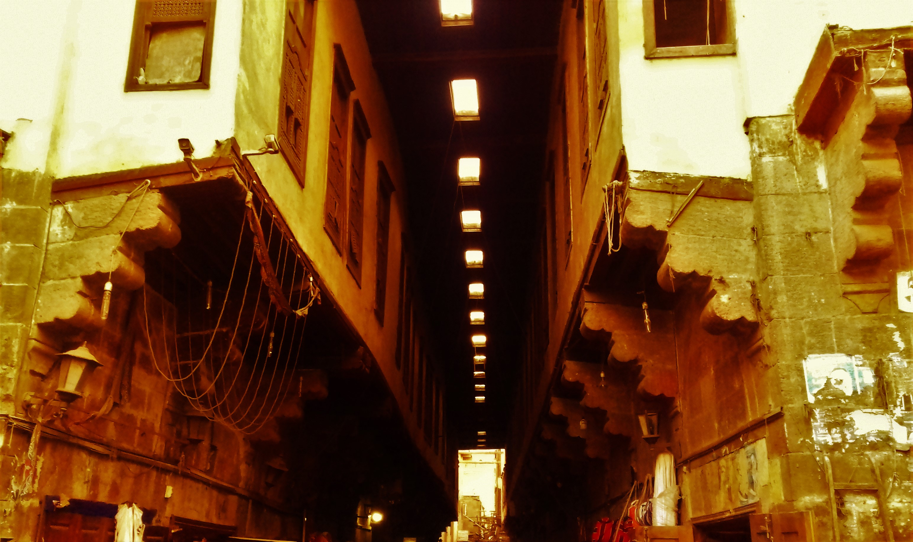 شارع الخيامية بمنطقة الغورية تم التقاط الصورة باستخدام كاميرا 8 ميجا بيكسل هاتف Samsung Galaxy J3